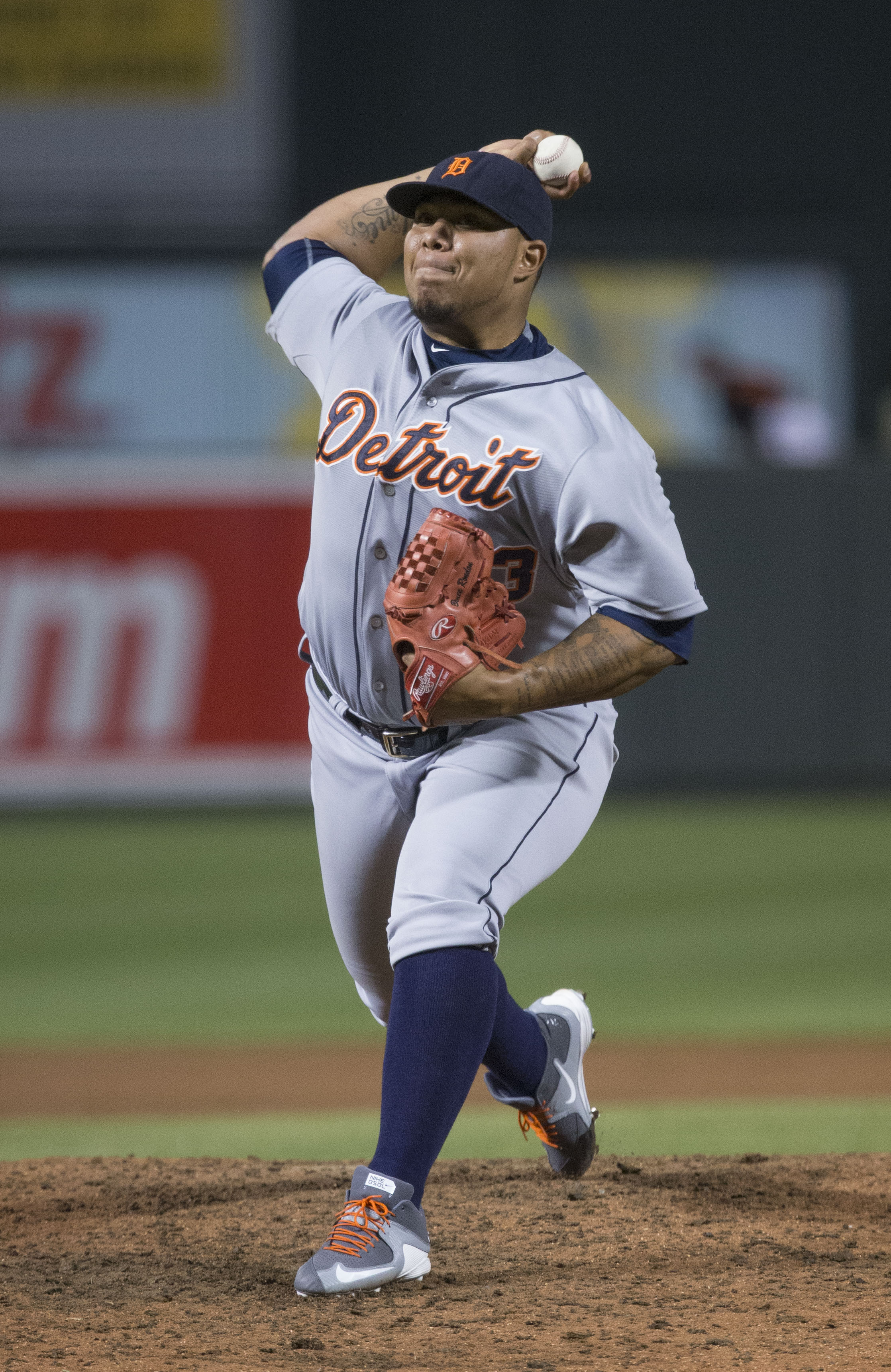 Tigers at Orioles 7/31/15